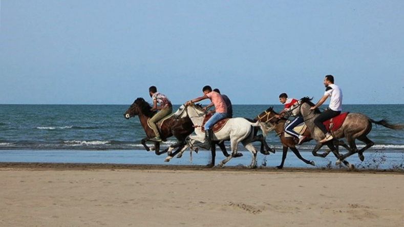 مسابقات سوارکاری جام غدیر در رودسر به روایت تصویر مسابقات سوارکاری جام غدیر گرامیداشت شهید مدافع امنیت حسن عشوری با حضور سوارکاران گیلان و مازندران در ساحل شهدای رودسر